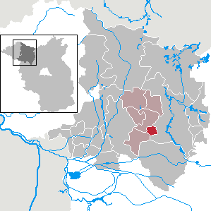 Dabergotz in Brandenburg (Country) - District Ostprignitz-Ruppin